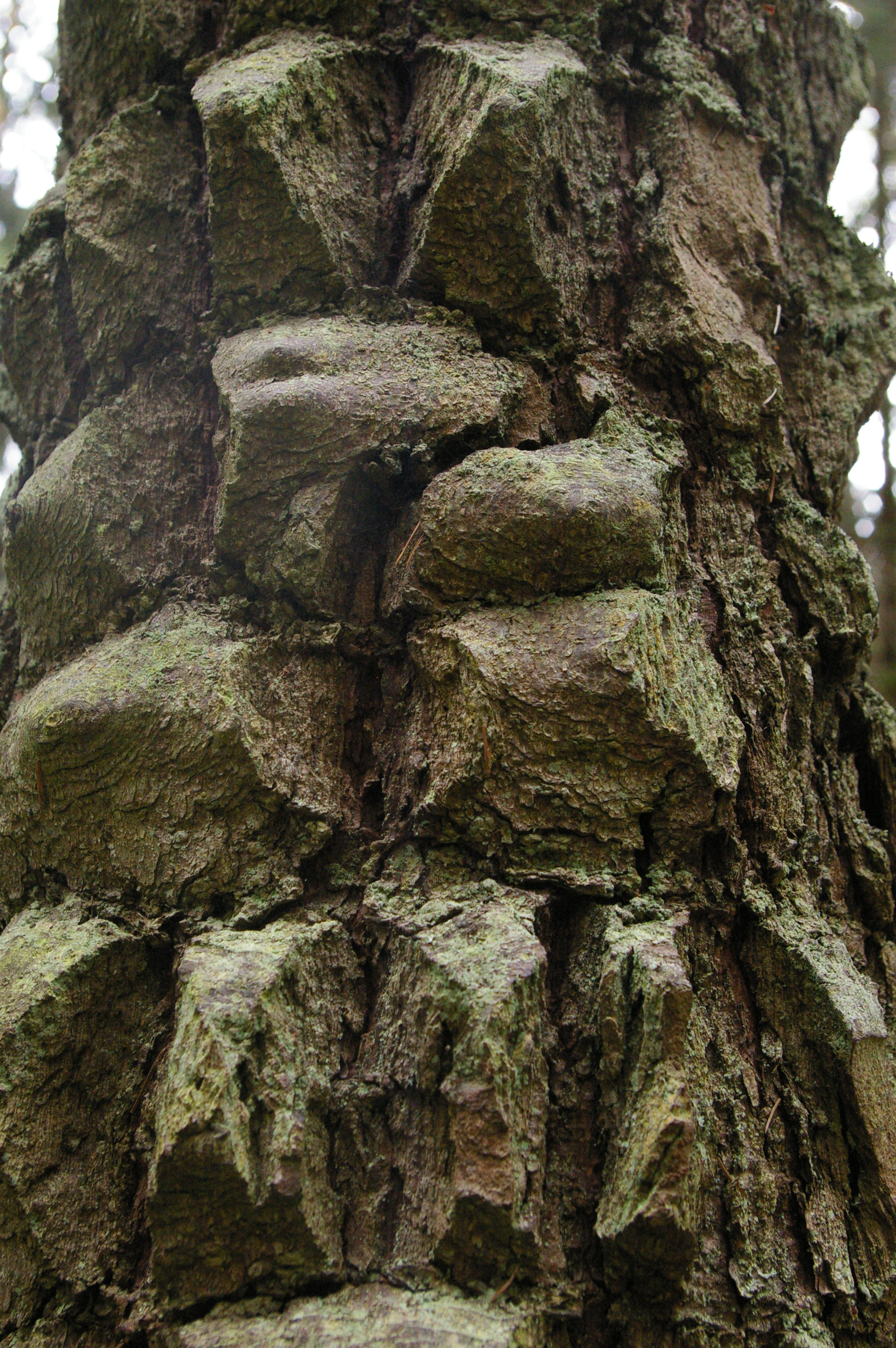 Stammausschnitt der estnishen "Krokodilpanzer-Fichte"